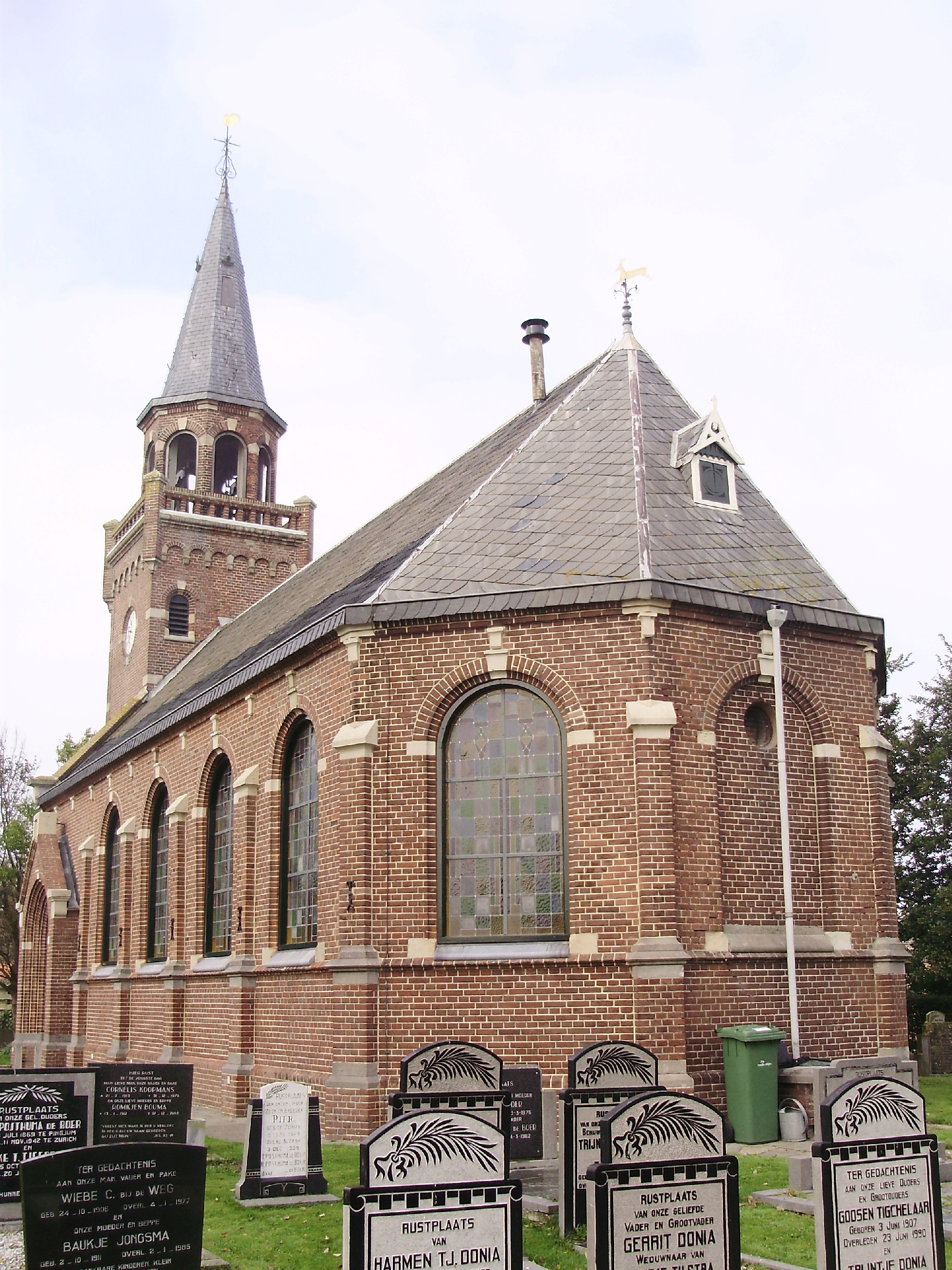 Kerk Zurich Friesland